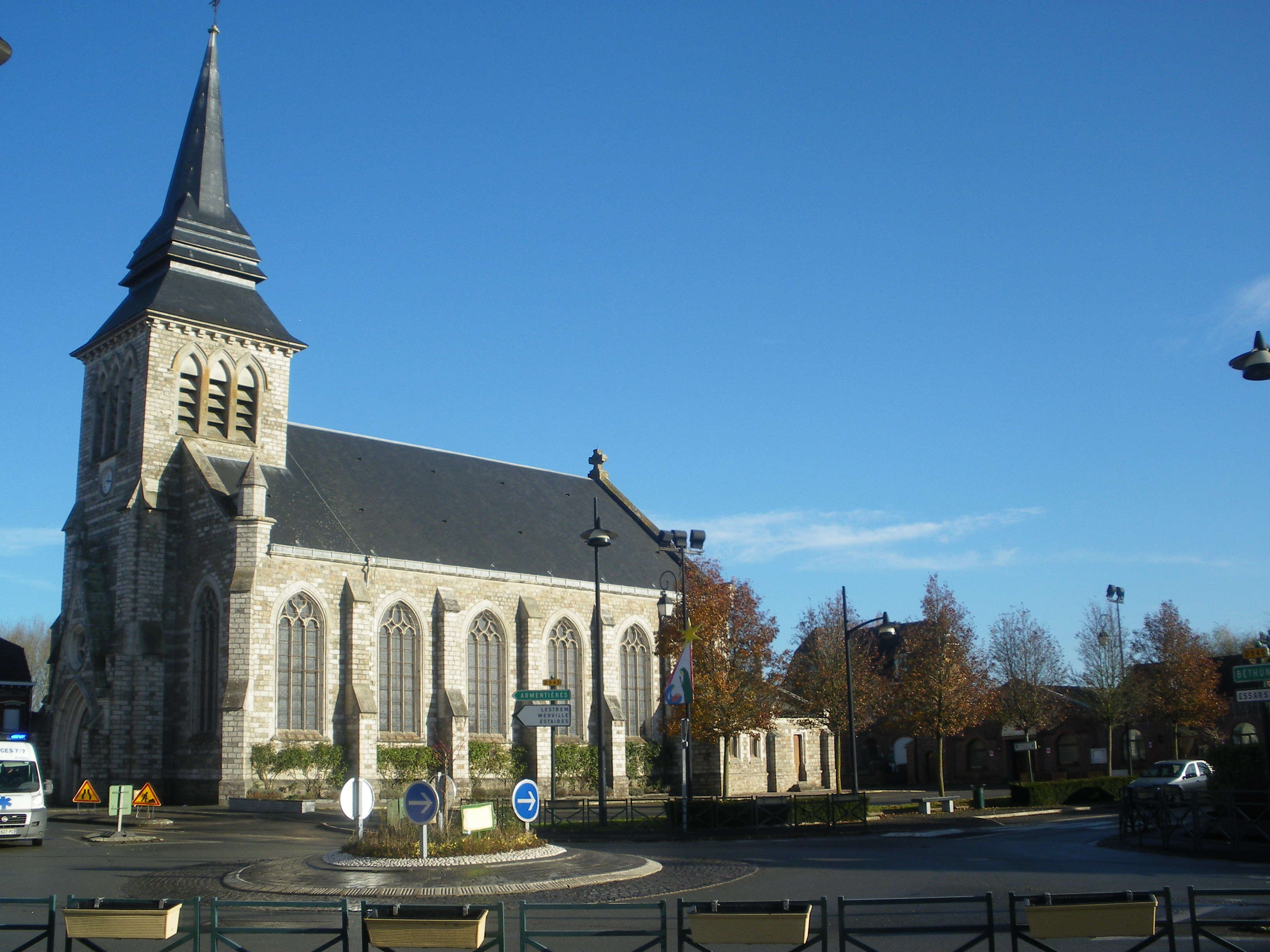 Carrefour central de Locon, avec au fond l'église.